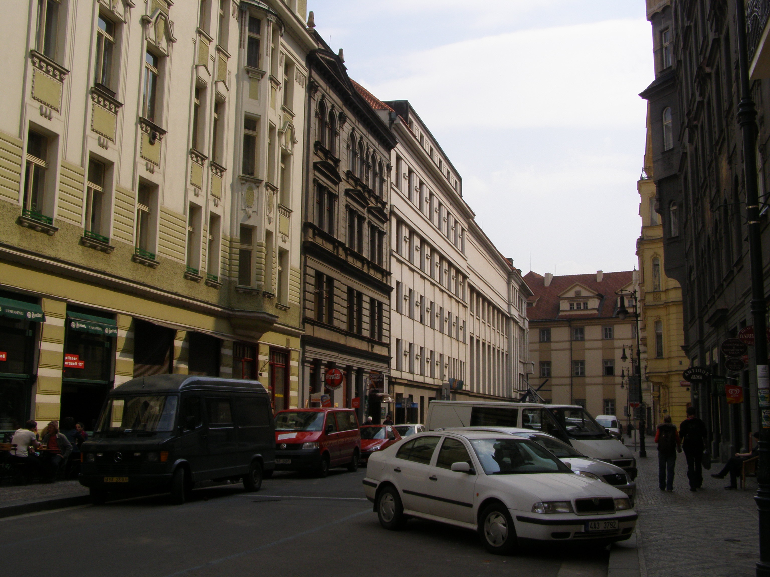 Praha, jižní část ulice Valentinská